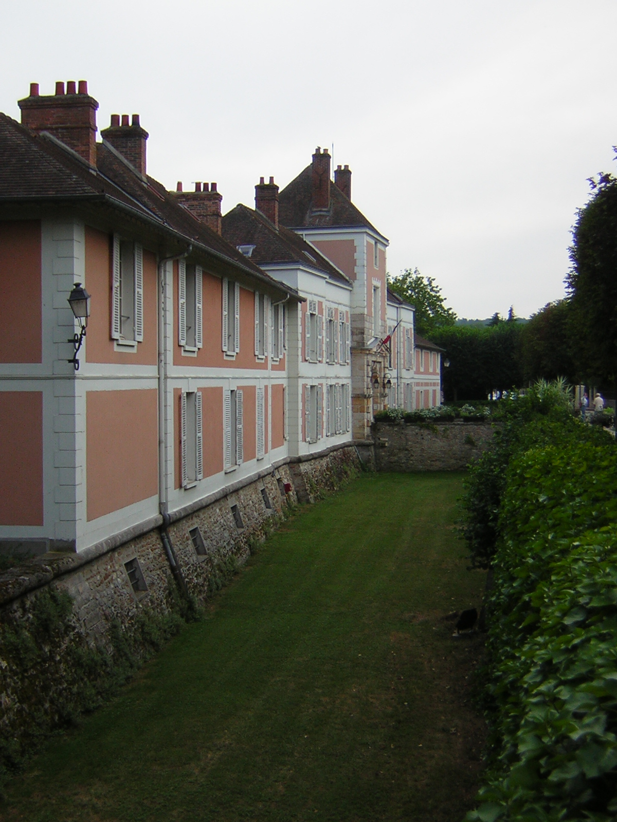 Lardy (91) Mairie